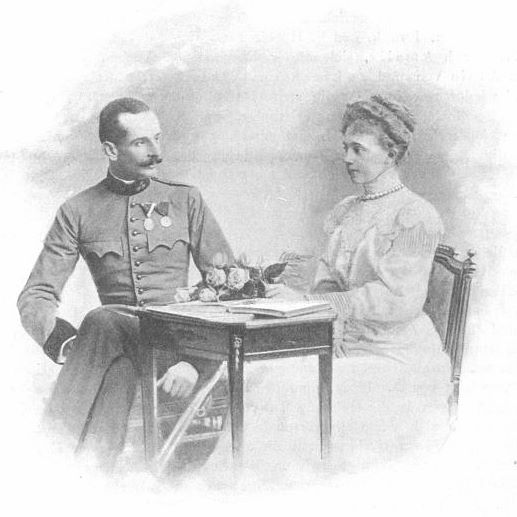 Alois von und zu Liechtenstein (1869-1955) Prinz von Liechtenstein mit Frau Elisabeth Amalia. Prince Aloys of Liechtenstein and his wife Elisabeth Amalia Prince Aloïs de Liechtenstein et sa femme Elisabeth Amalia Principe Alois de Liechtenstein e sua esposa Elisabeth Amalia